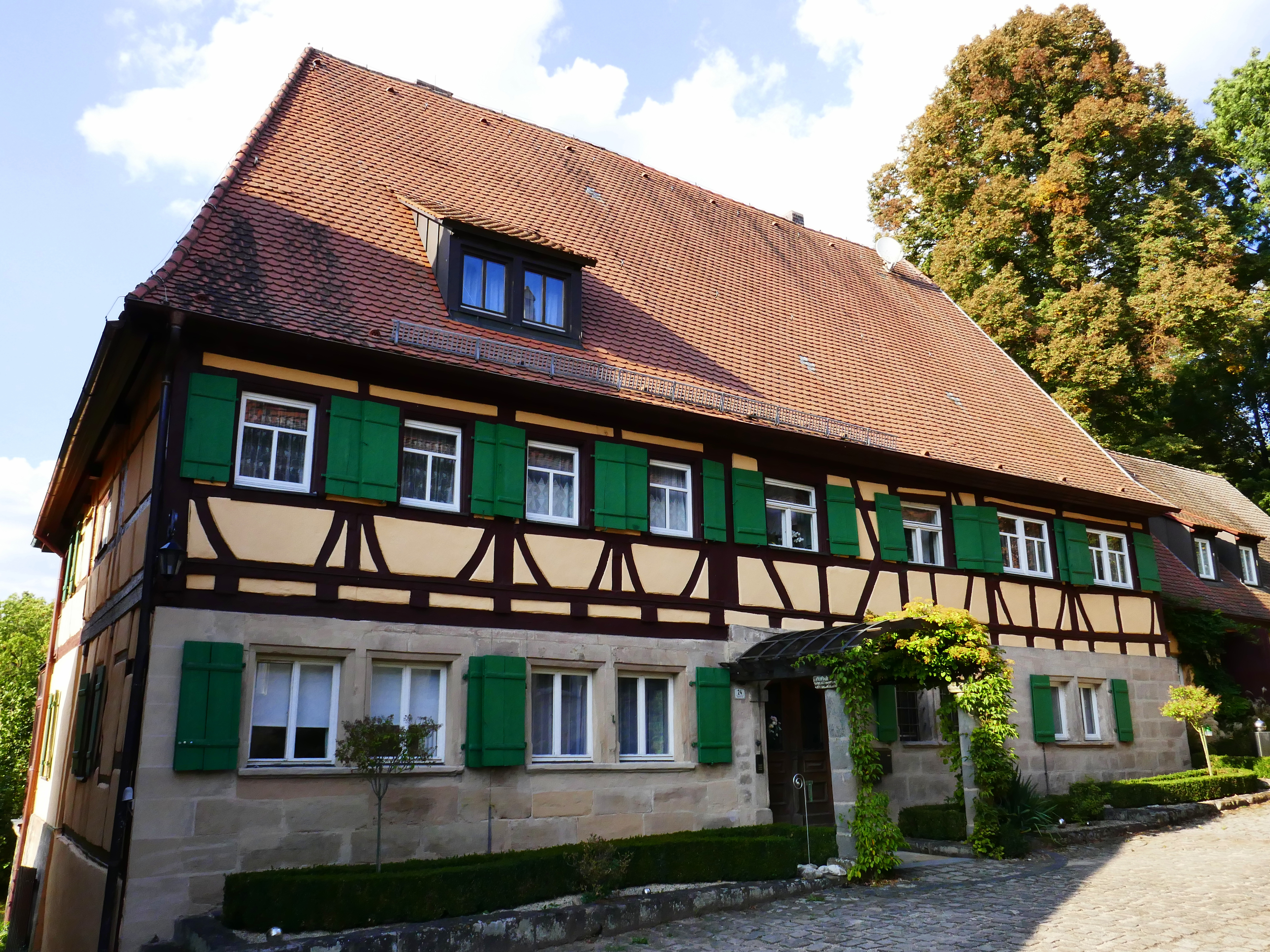 Schönes, sehr gepflegtes Anwesen